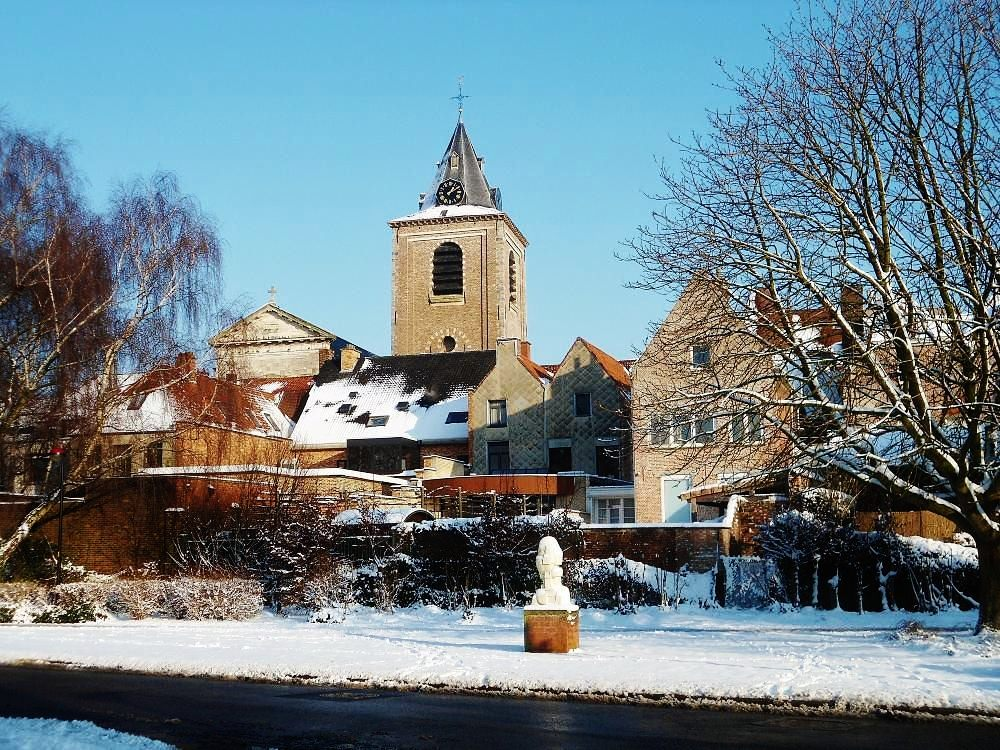 Zicht op de onlangs gerestaureerde toren van de Sint-Vedastuskerk te Menen (België) - Foto Paul Gosselin